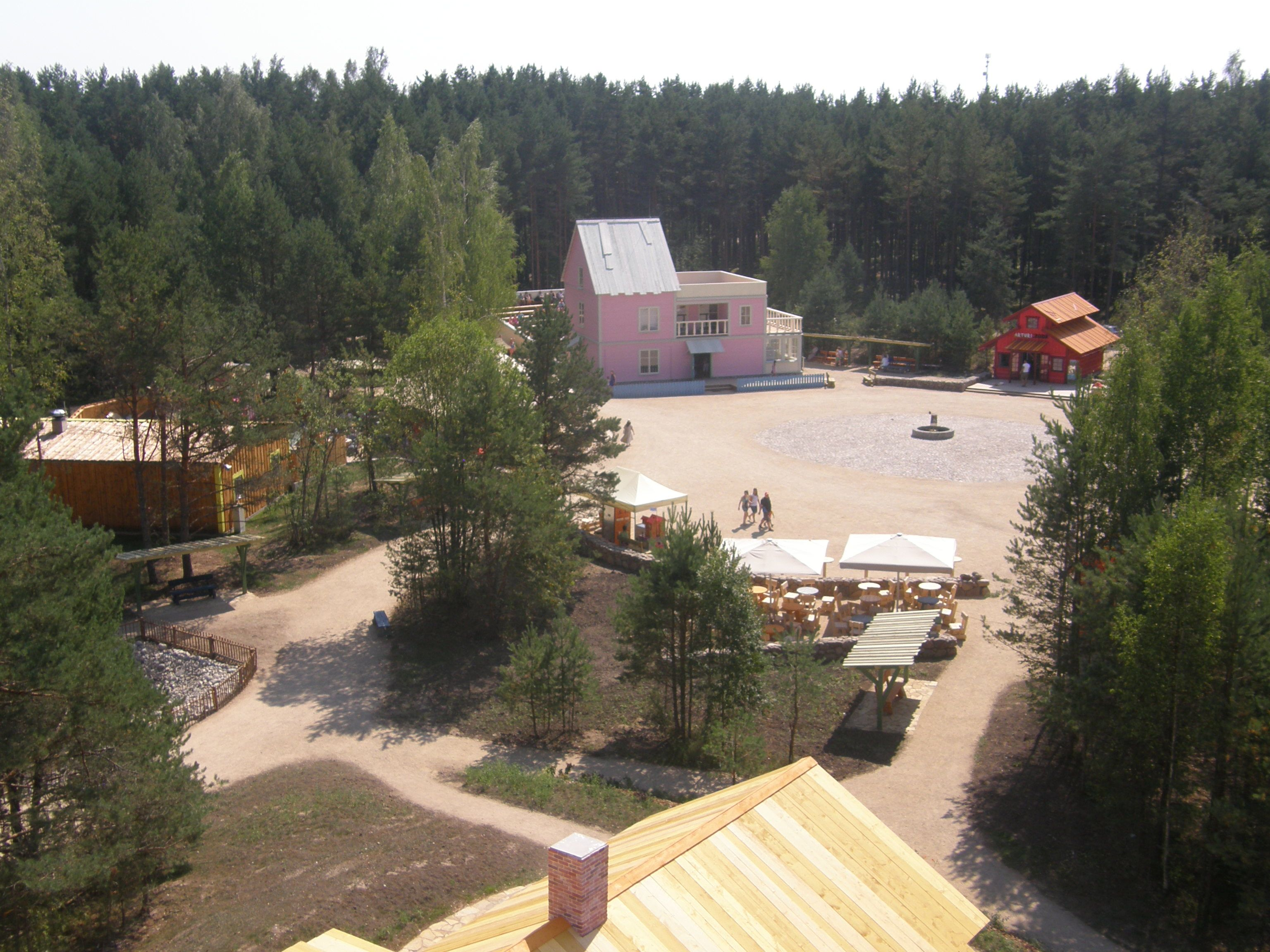 Lottemaa vaade Lotte maja tornist.